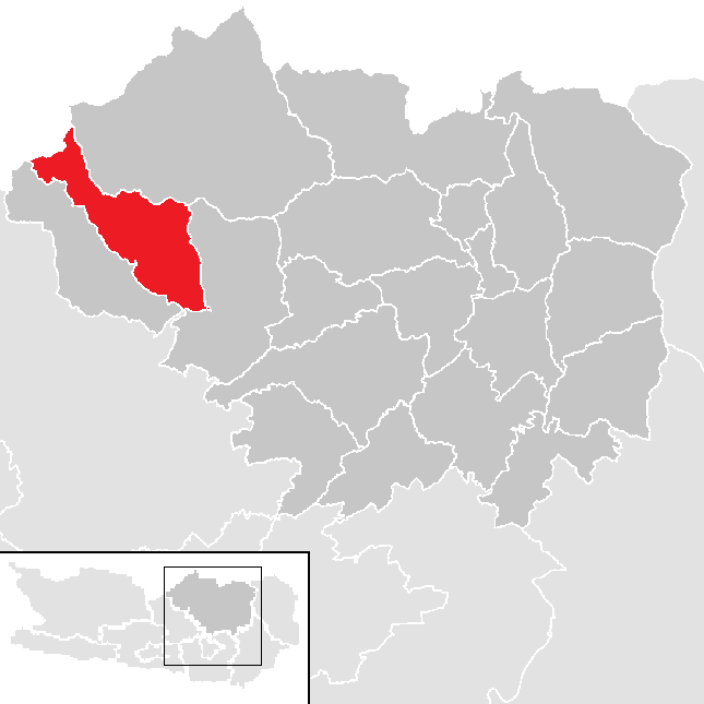 Bezirk Sankt Veit an der Glan